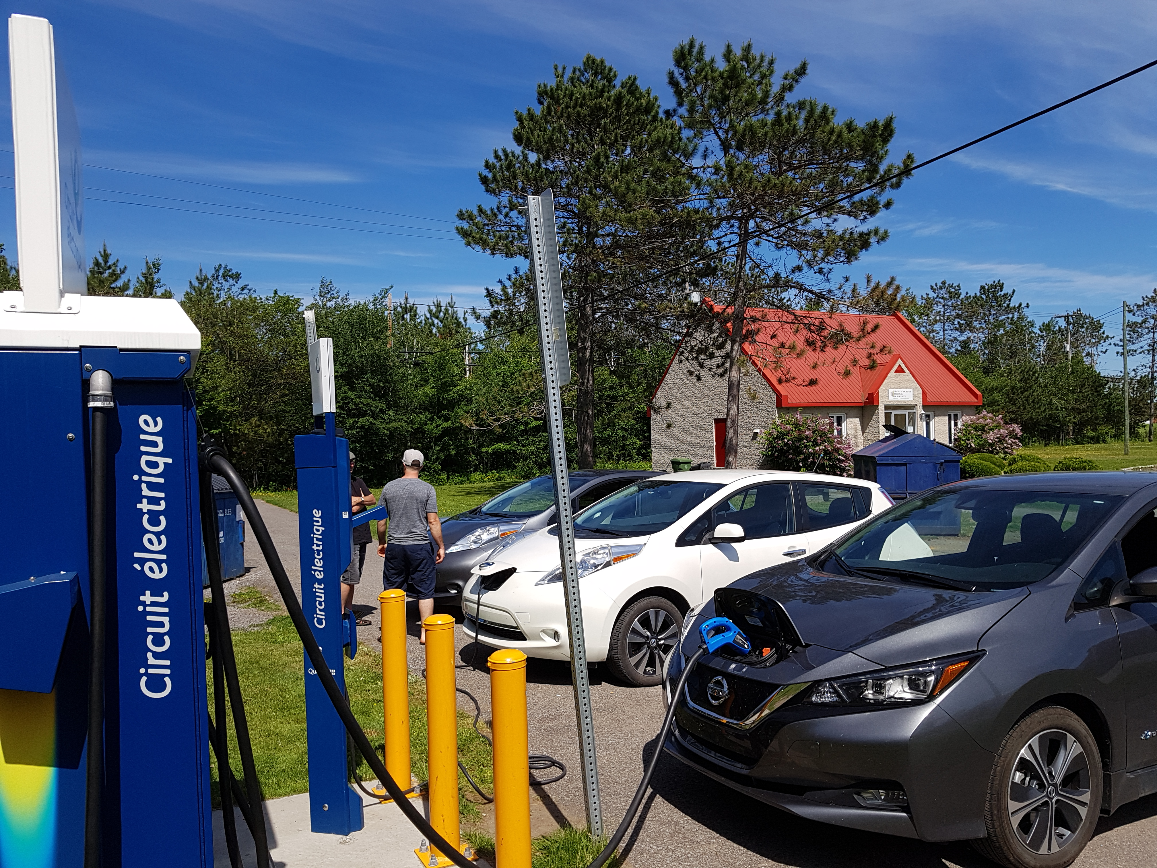 Trois Nissan LEAF en recharge aux bornes de recharge du Circuit électrique situées au restaurant Le Chavigny de Deschambault-Grondines, près de l'autoroute 40 en juin 2019.